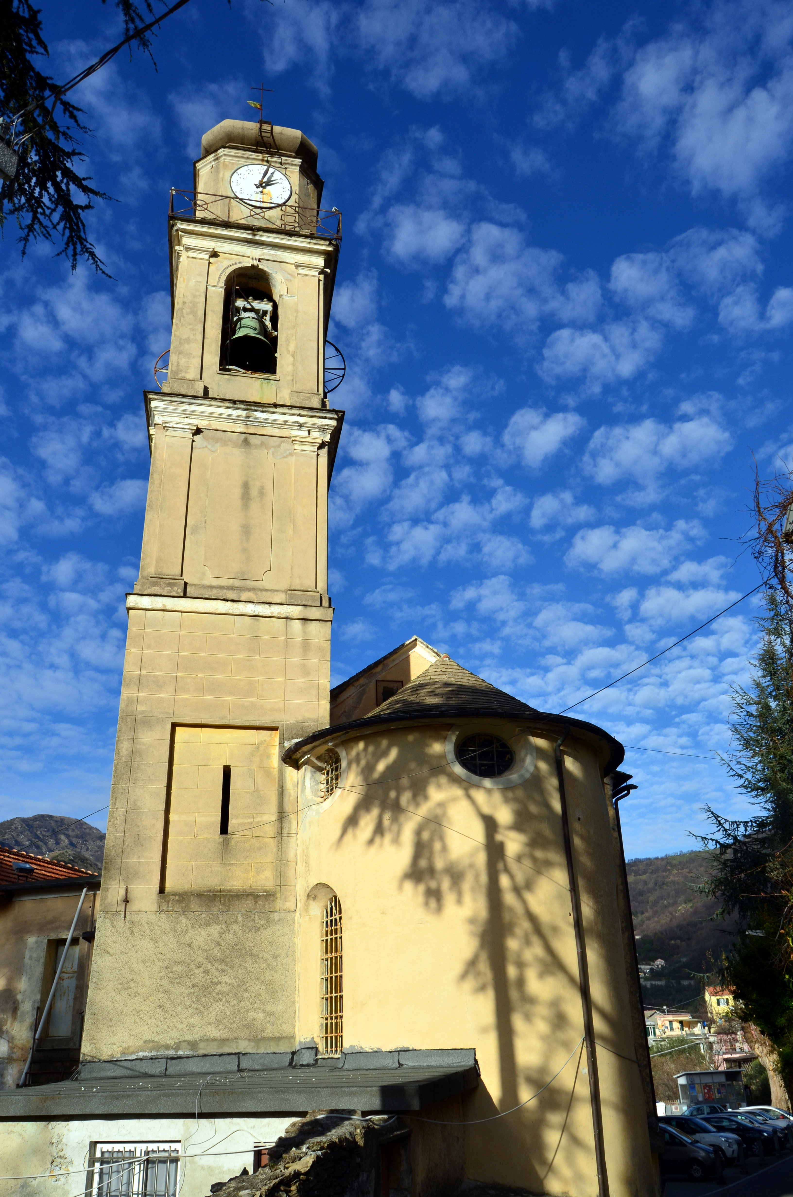 Chiesa di San Pietro Apostolo di Capreno, Sori, Liguria, Italia